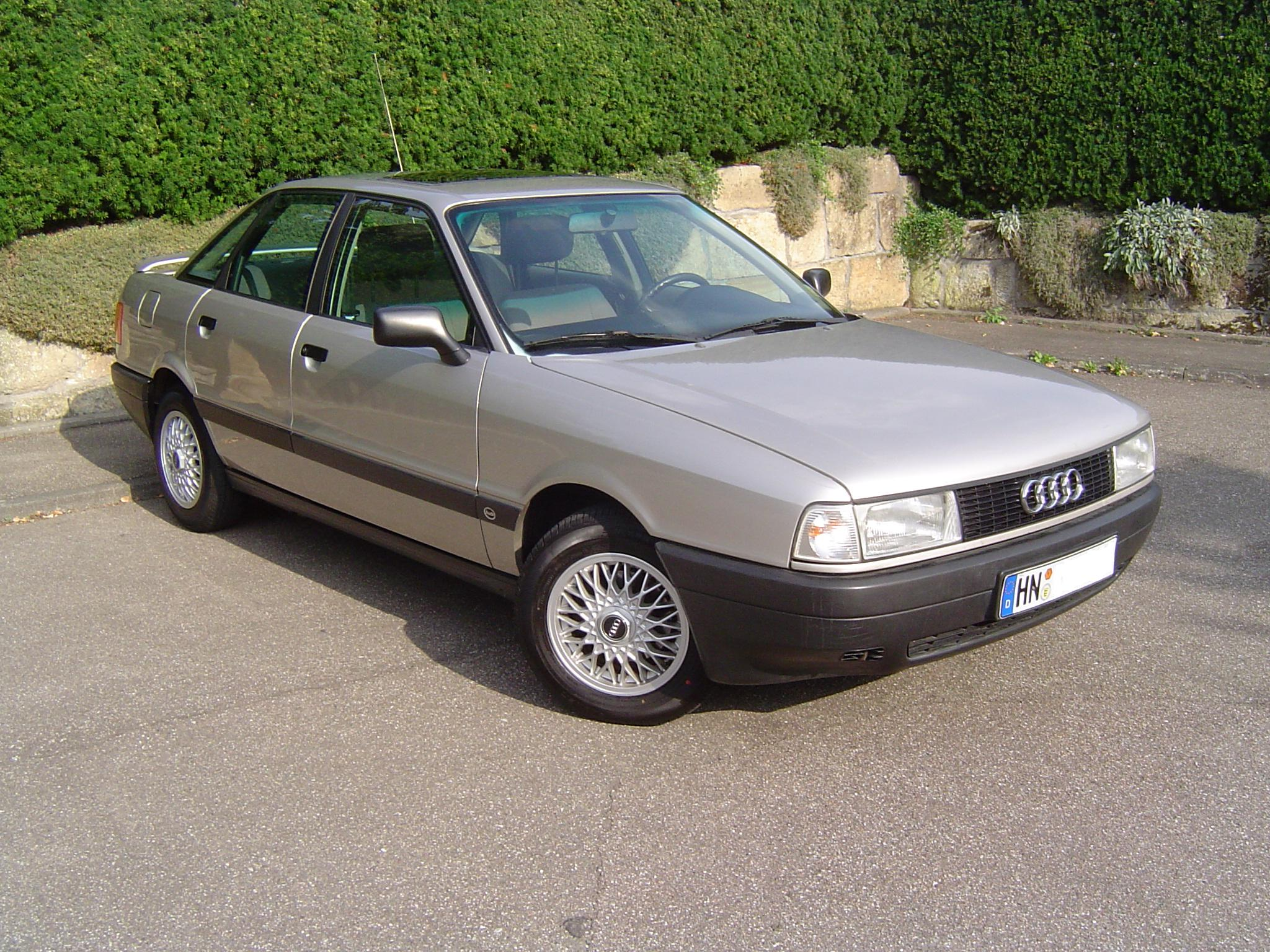 Audi 80 B3 Typ 89. Baujahr 12/86, Motorkennbuchstabe RU, 55 kW / 75 PS bei 4500 1/min, 140 Nm bei 2500 1/min